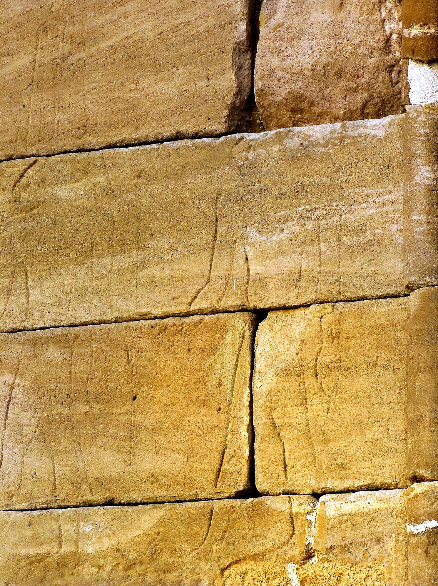 Esta foto participó en el juego En un Lugar de Flickr